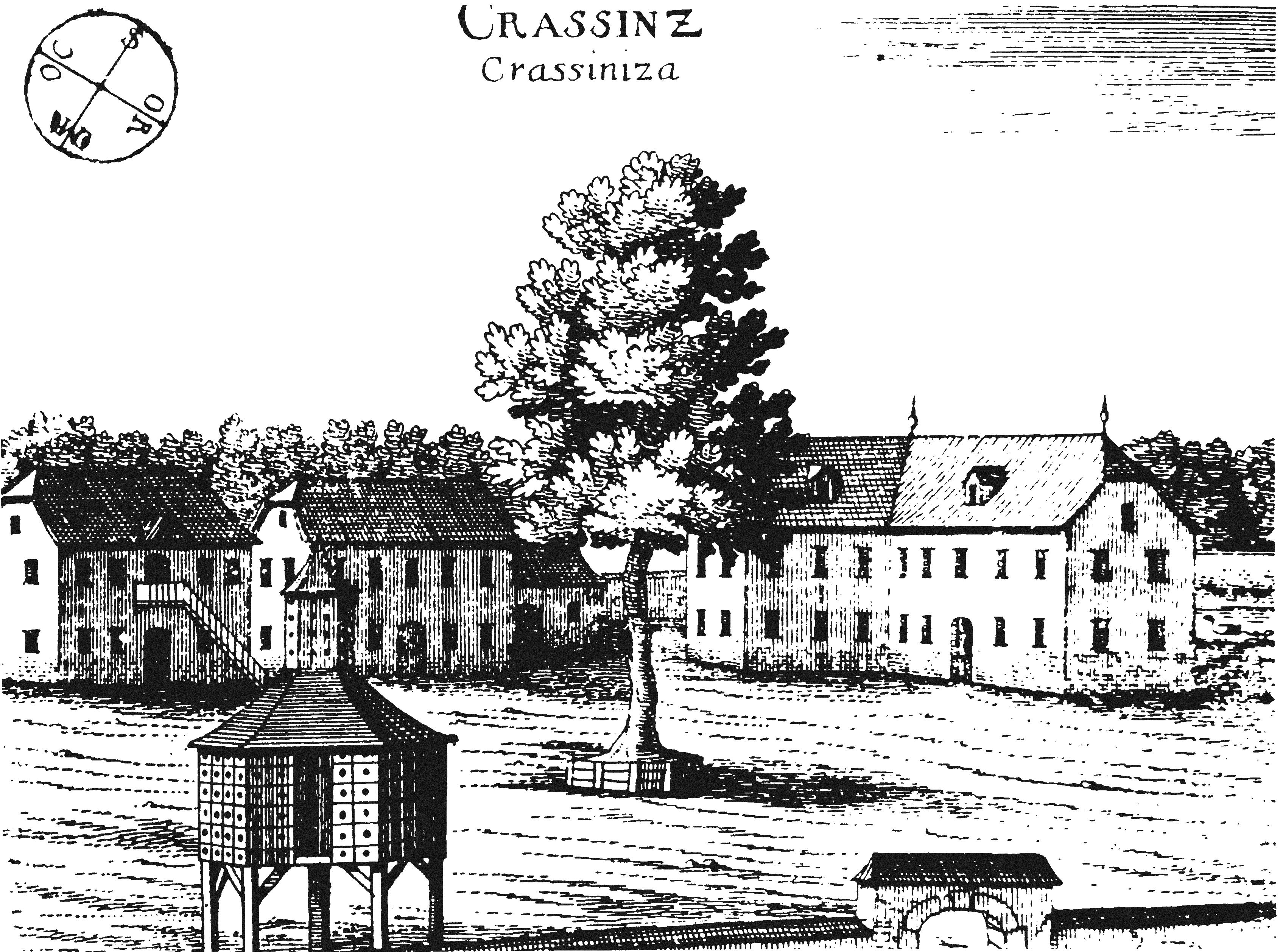 Slava vojvodine Kranjske